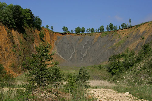 Naturschutzgebiet Andril in Liesberg